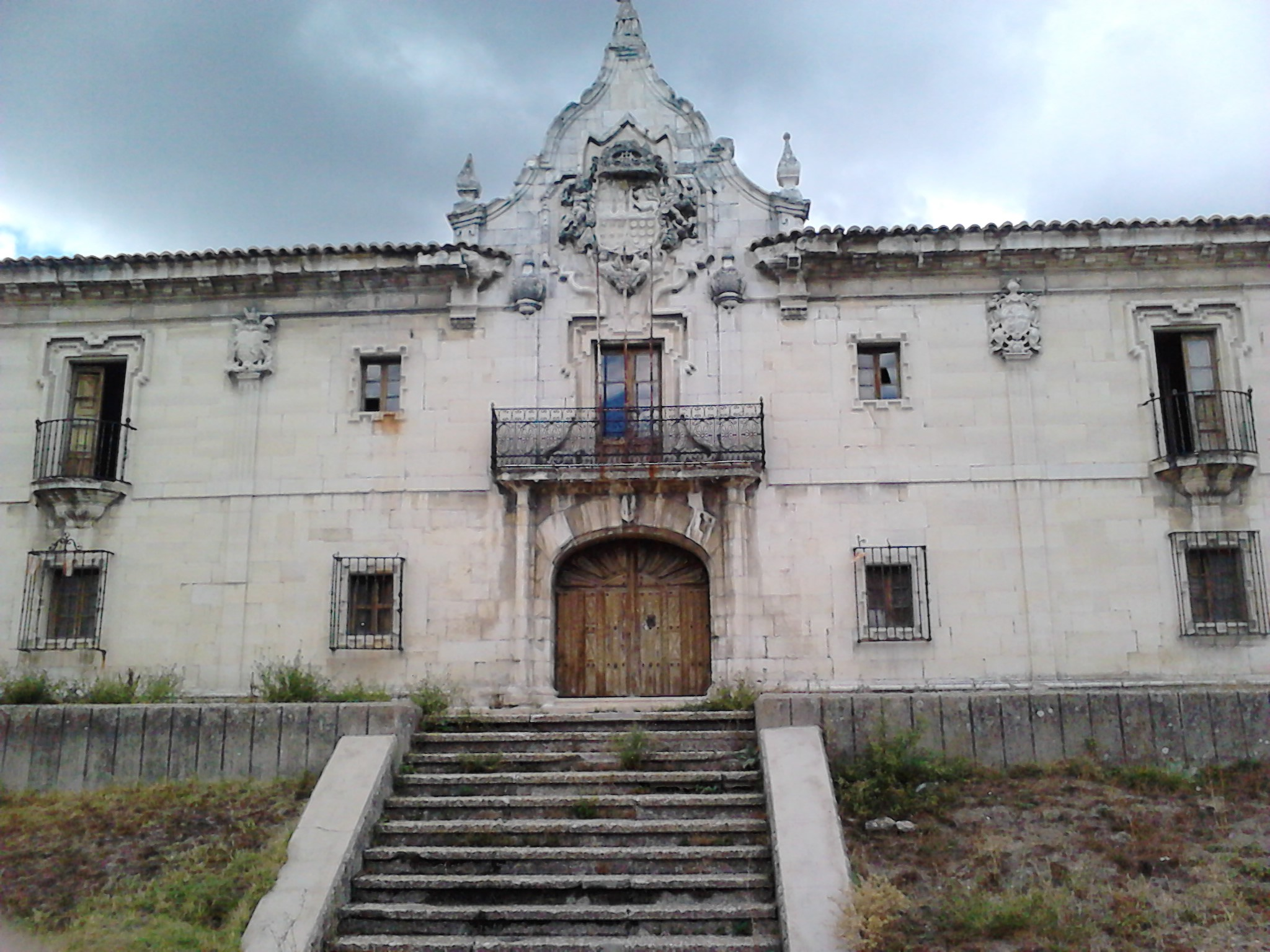 Palacio de estilo barroco situado en el municipio de Guardo (Palencia).